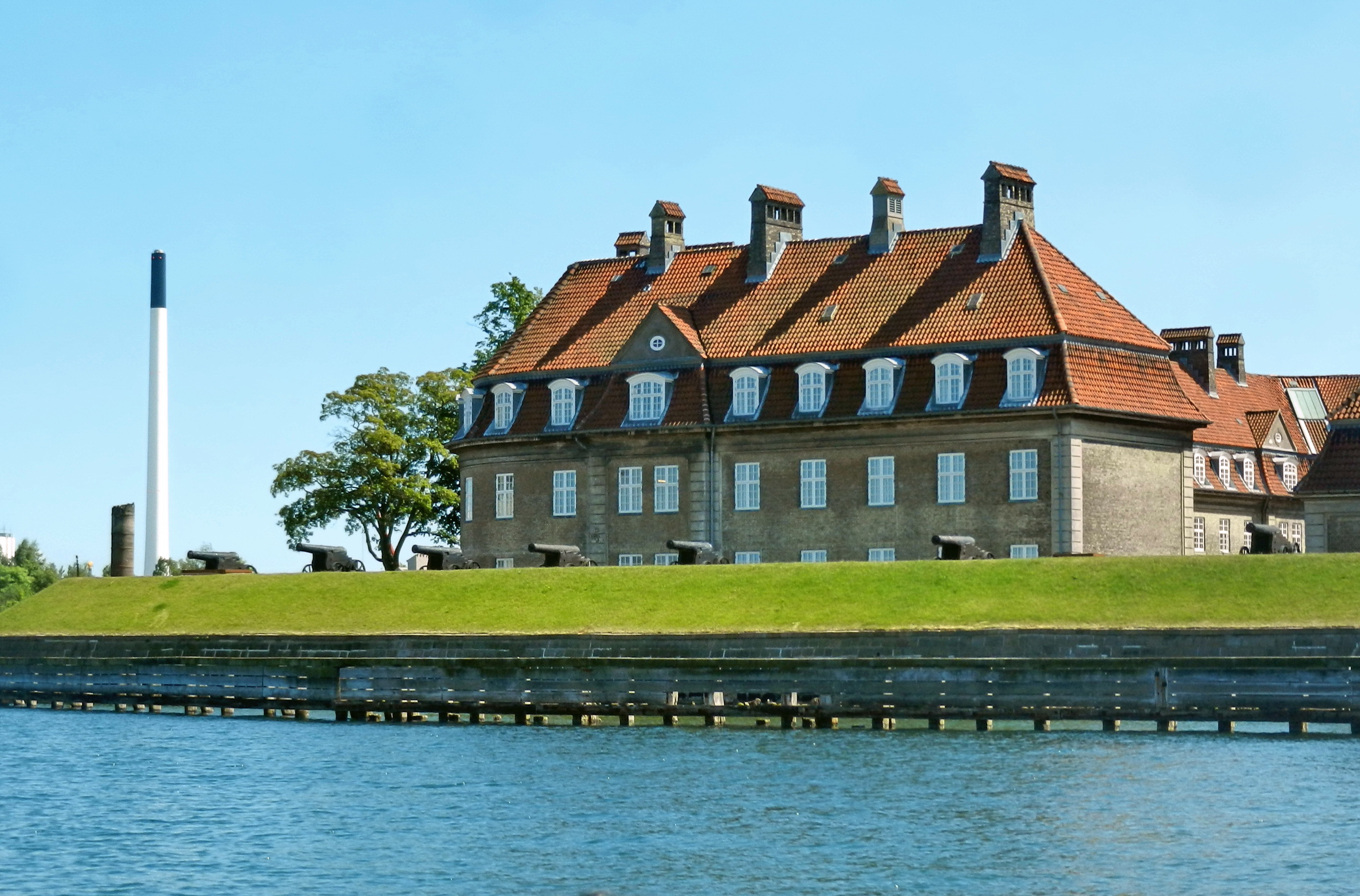 Kopenhagen